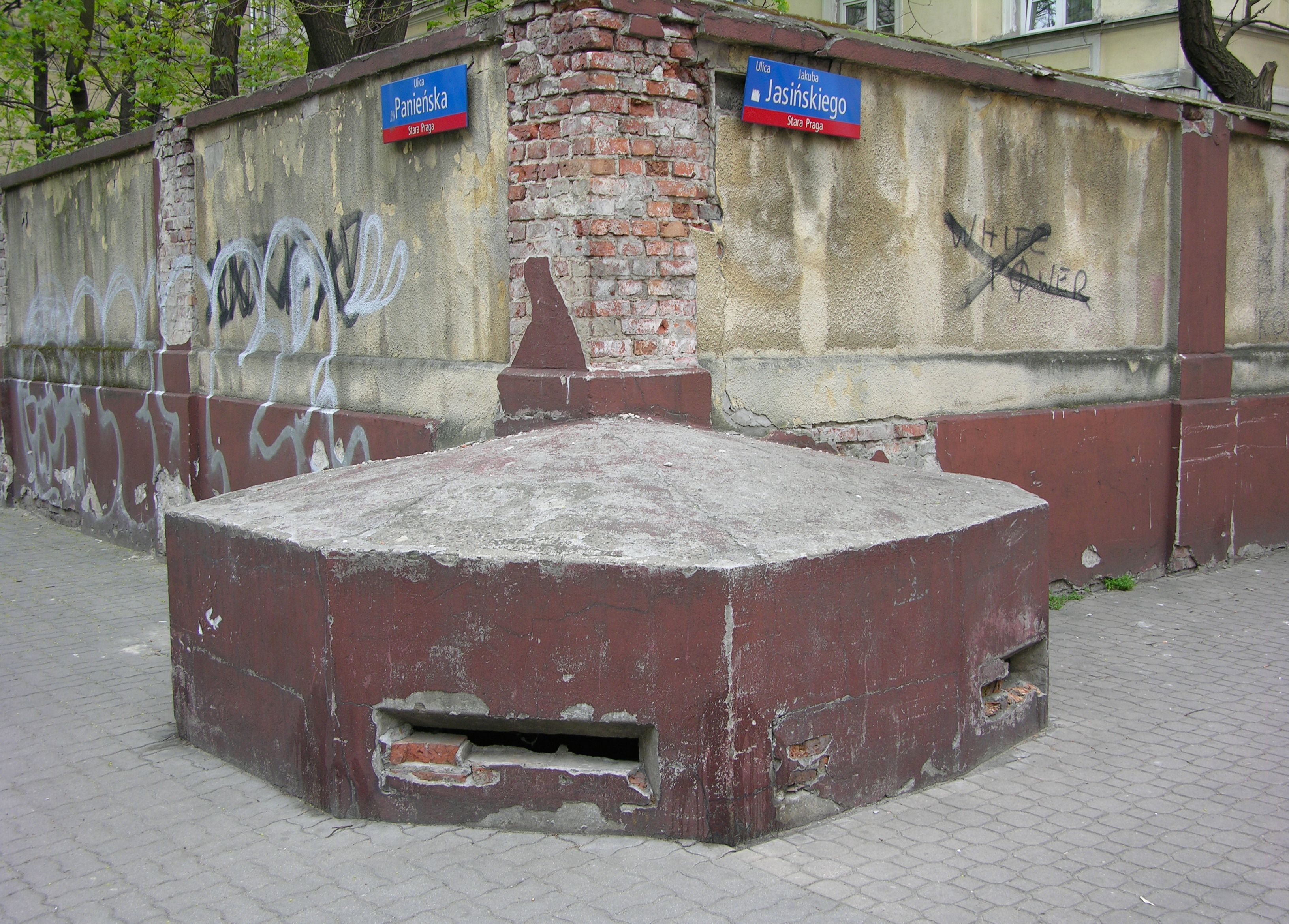 Niemiecki bunkier przy murze Szpitala Praskiego na rogu ulic Jasińskiego o Panieńskiej w Warszawie